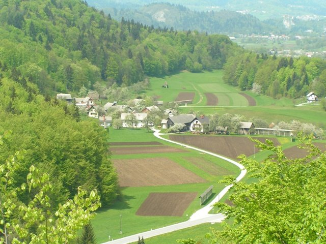 Panoramska slika naselja Lancovo.